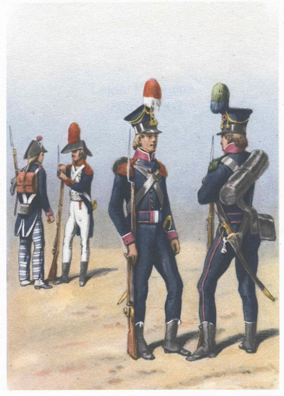 Bronisław Gembarzewski, Legia Naddunajska, Fizylier, dwaj grenadierzy oraz strzelec.